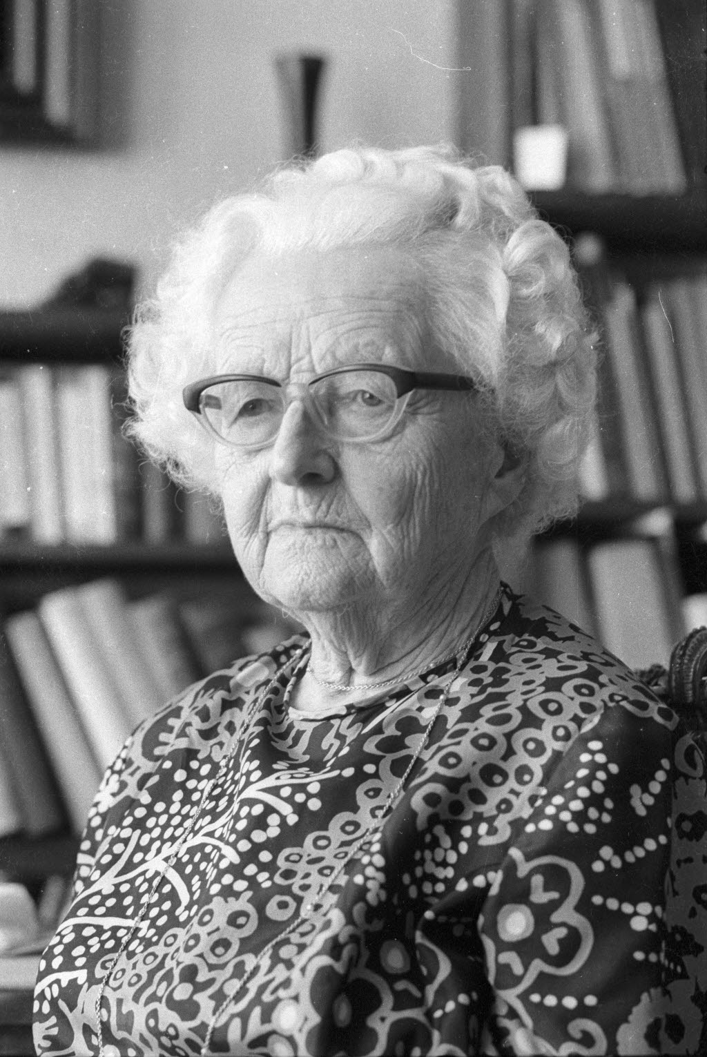 Die Kunsthistorikerin vollendet am 27.07.1975 ihr 90. Lebensjahr.